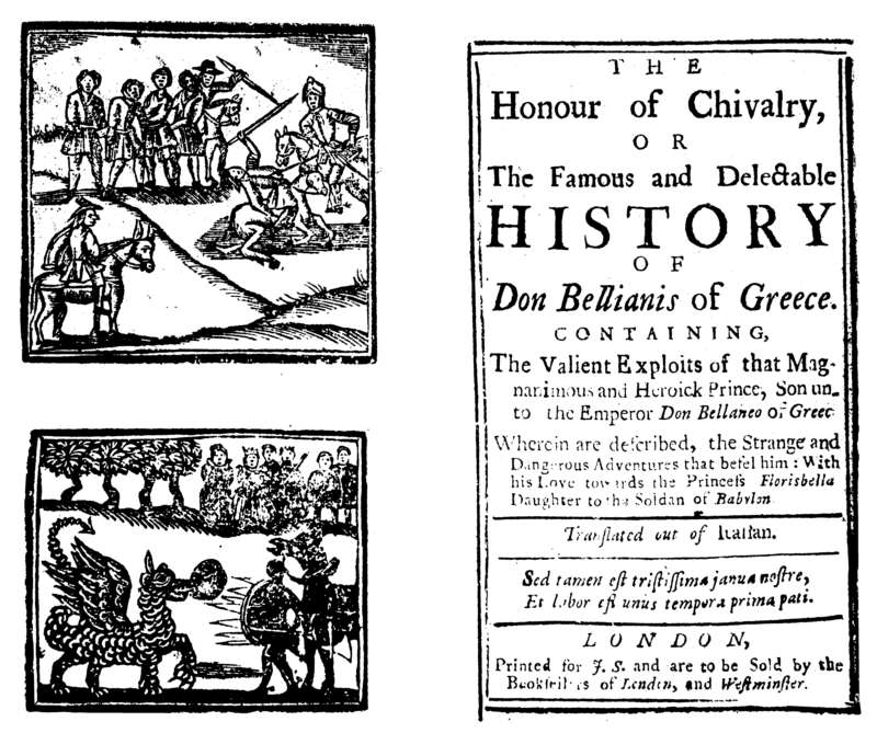 The Honour of Chivalry, or the Famous and Delectable History of Don Bellianis of Greece (London: J. S.), englisches Buch des billigen Marktsegments, frühes 18. Jahrhundert, Text nach Géromino Fernandez, erstmals auf Englisch 1598 ediert, seinerzeit noch als kostbares Buch.